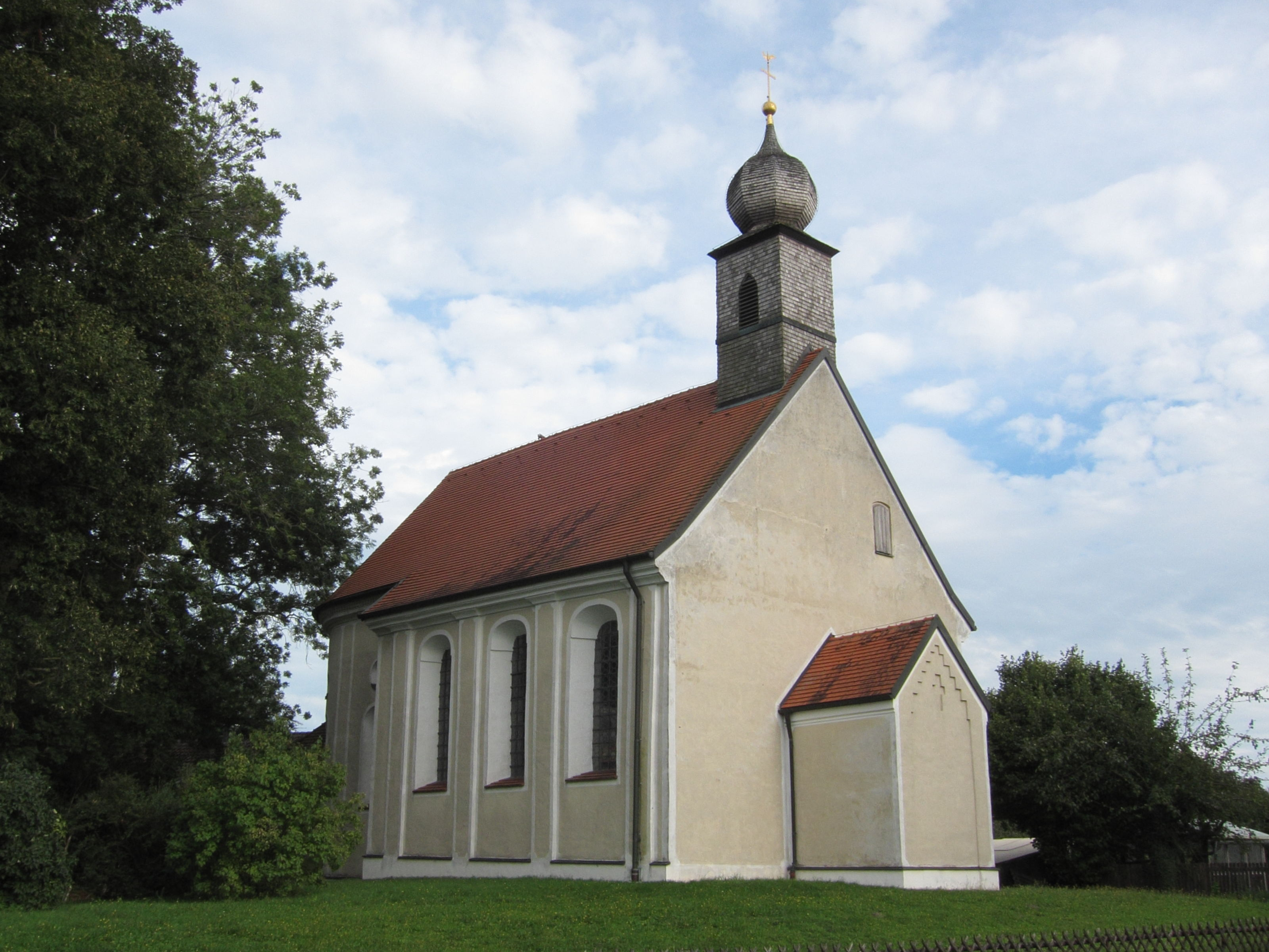 Grafing; katholische Filialkirche St. Sebastian, Saalbau mit Dachreiter in barocken Formen, von Hans Kogler, 1699; mit Ausstattung.